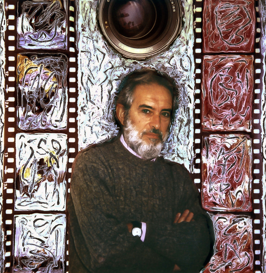 Fotopolaroid manipolata di Augusto De Luca, tratta dal libro "31 Napoletani di fine secolo", Electa Napoli - 1995.